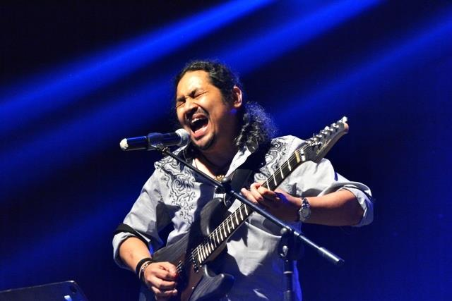 Erucakra Mahameru on stage